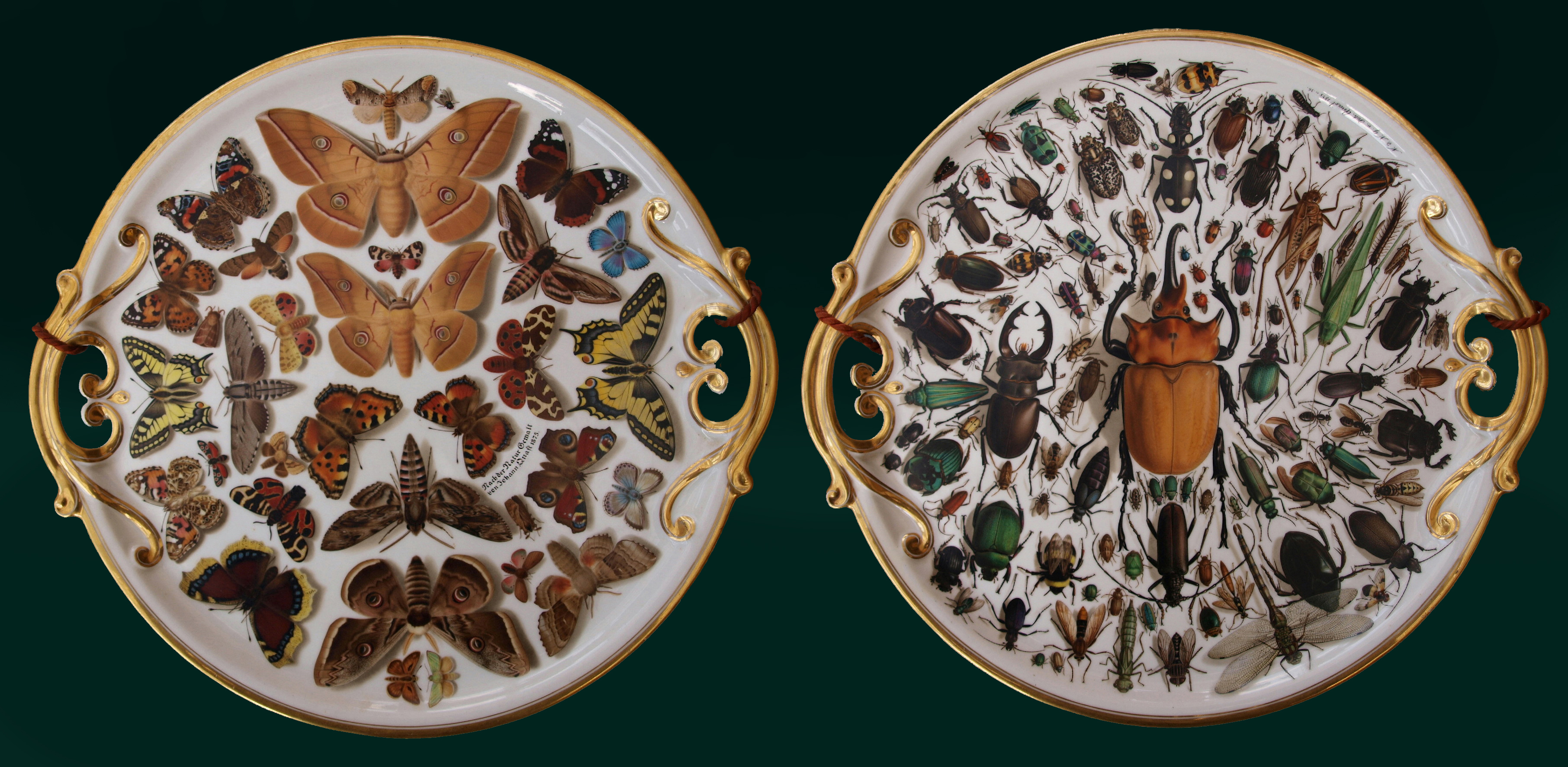 Porcelánové podnosy malované.Rok 1875-1876